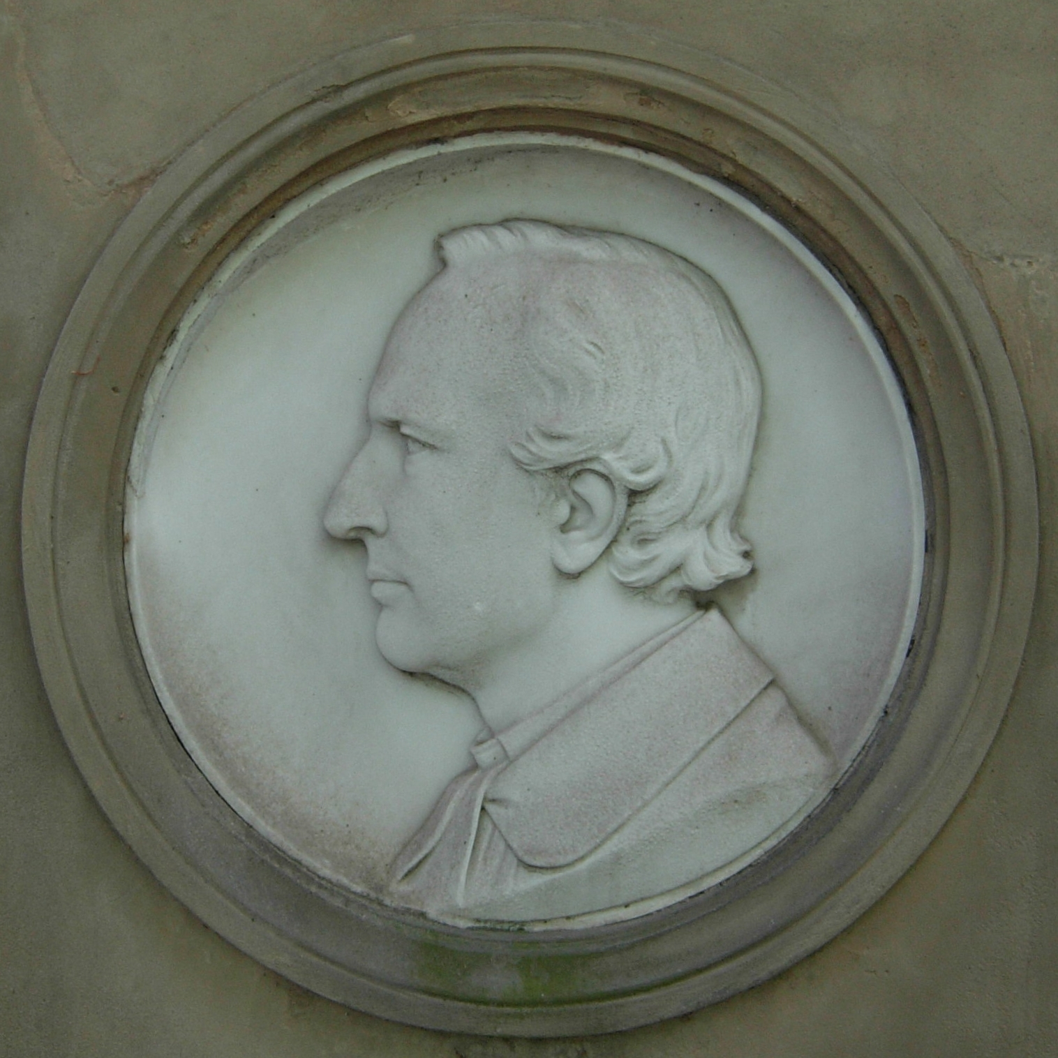 Albert Küppers: Marmor-Medaillon für den evangelischen Theologen Albrecht Wolters auf dem Alten Friedhof Bonn; Quelle (zu Küppers): Aufsatz des Bonner Stadtbaurats von Noël: Der Friedhof vor dem Sterntore in Bonn in den Rheinischen Geschichtsblättern (8. Jahrgang, Nr. 10, Bonn 1907)